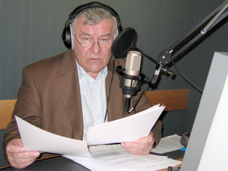 Joachim Kerzel bei der Vertonung der N24 Reportage "Rogue Waves" in einem ProSiebenSat.1 Produktion Berlin Schnittraum.